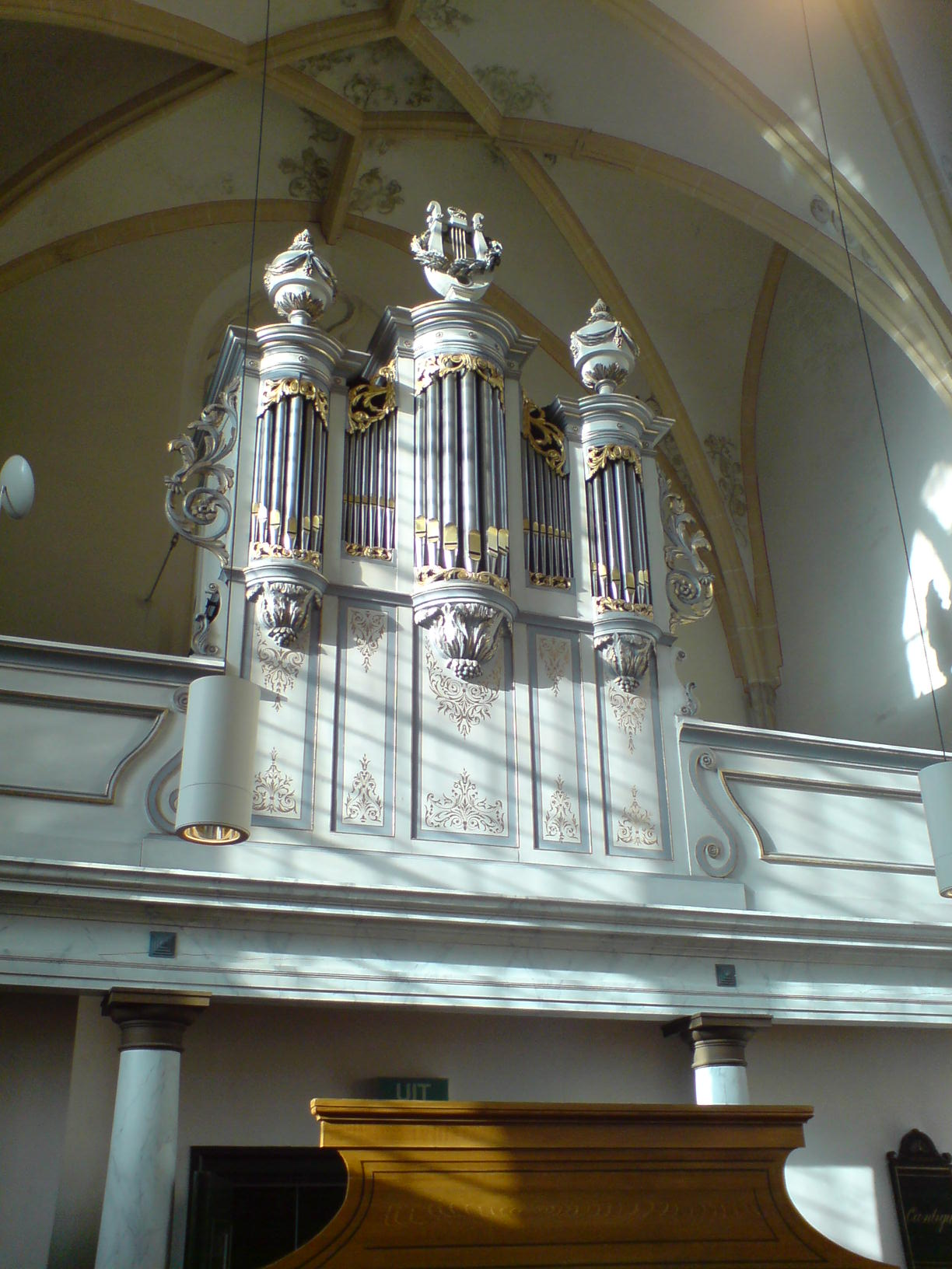 Een door Johannes Wilhelmus Timpe vervaardigd orgel. Te vinden in de Waalse kerk te Zwolle.